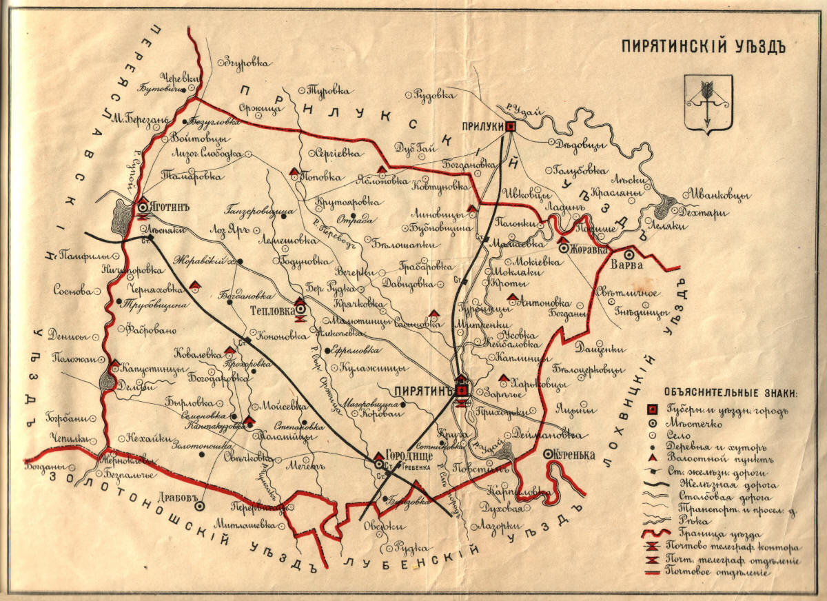 Карта Пирятинського повіту